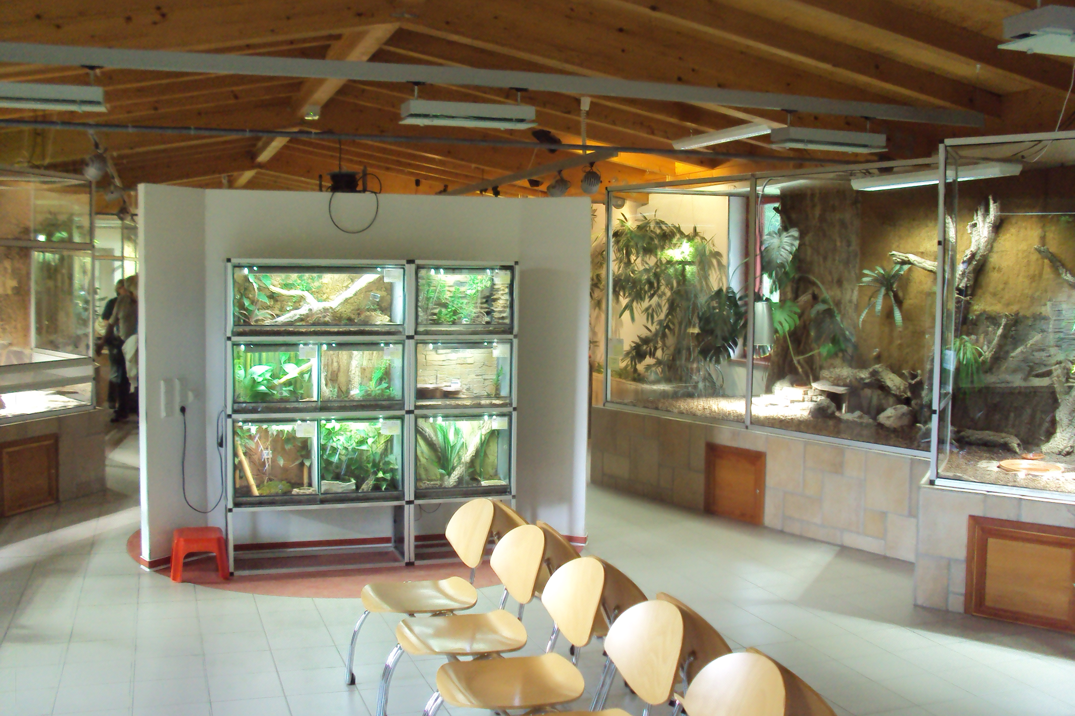 Interiér Motýlího domu v Jonsdorfu